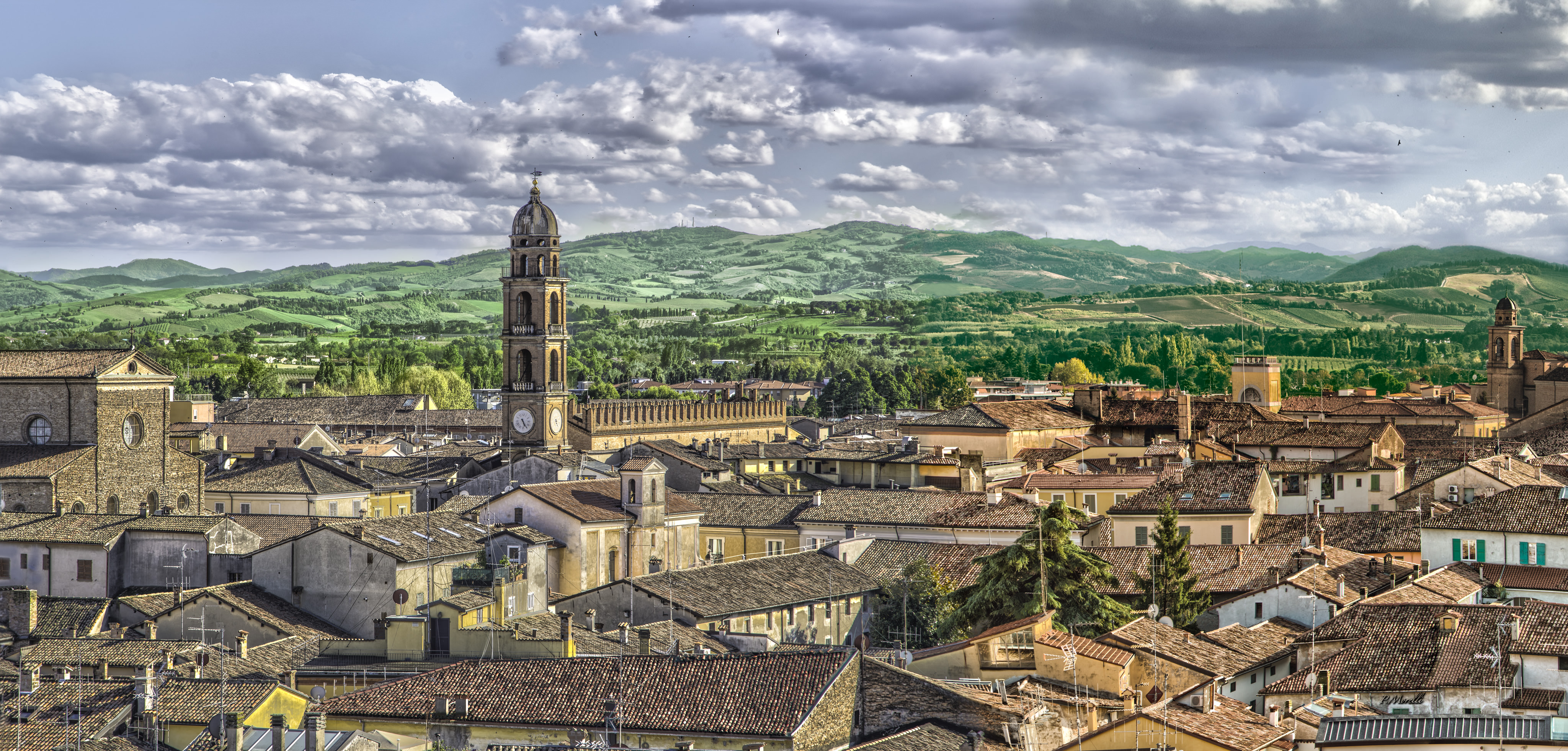 Panoramica su Faenza. Foto di Paolo Morelli.